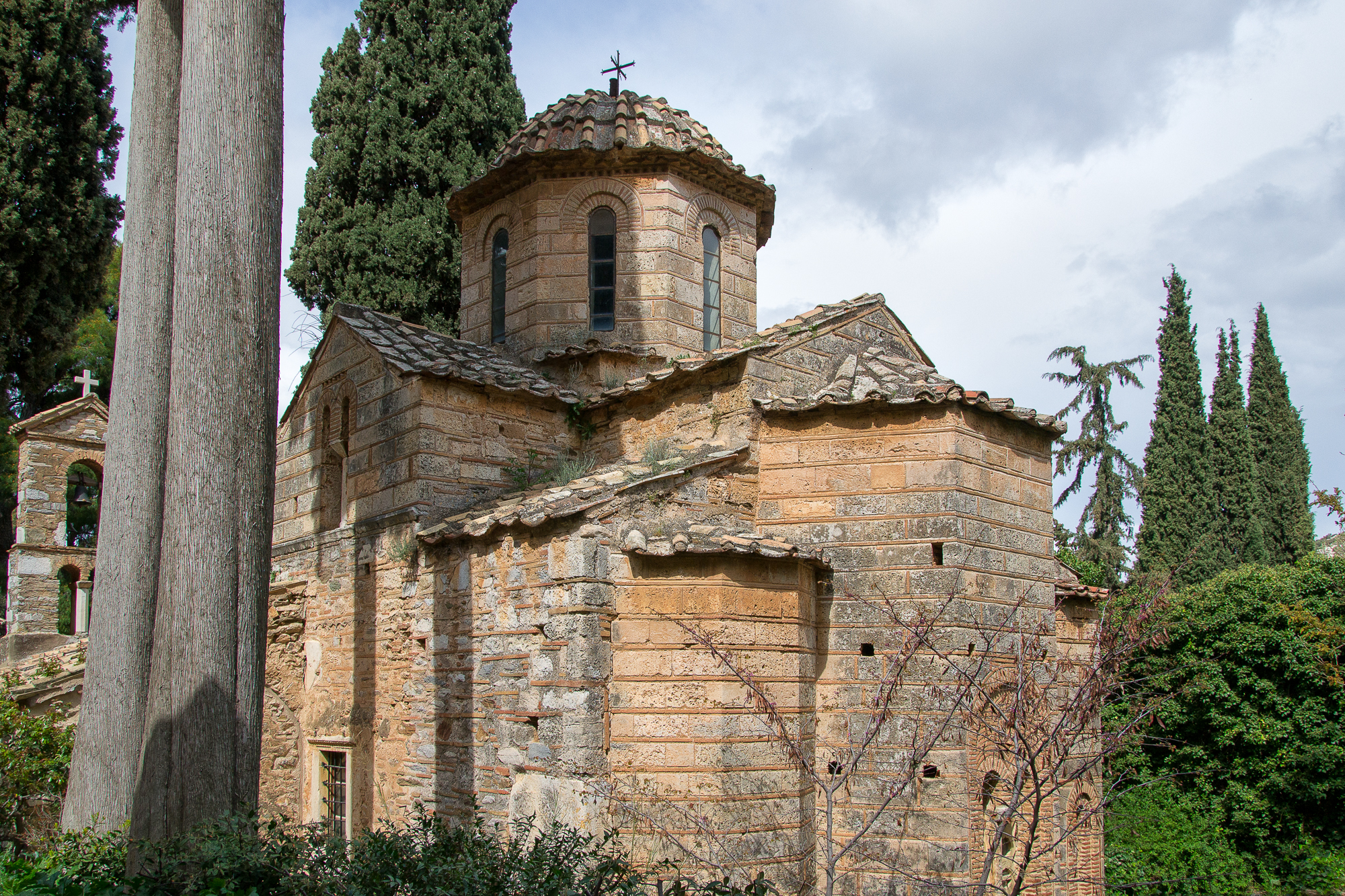 Μονή Καισαριανής«Μονή Καισαριανής»